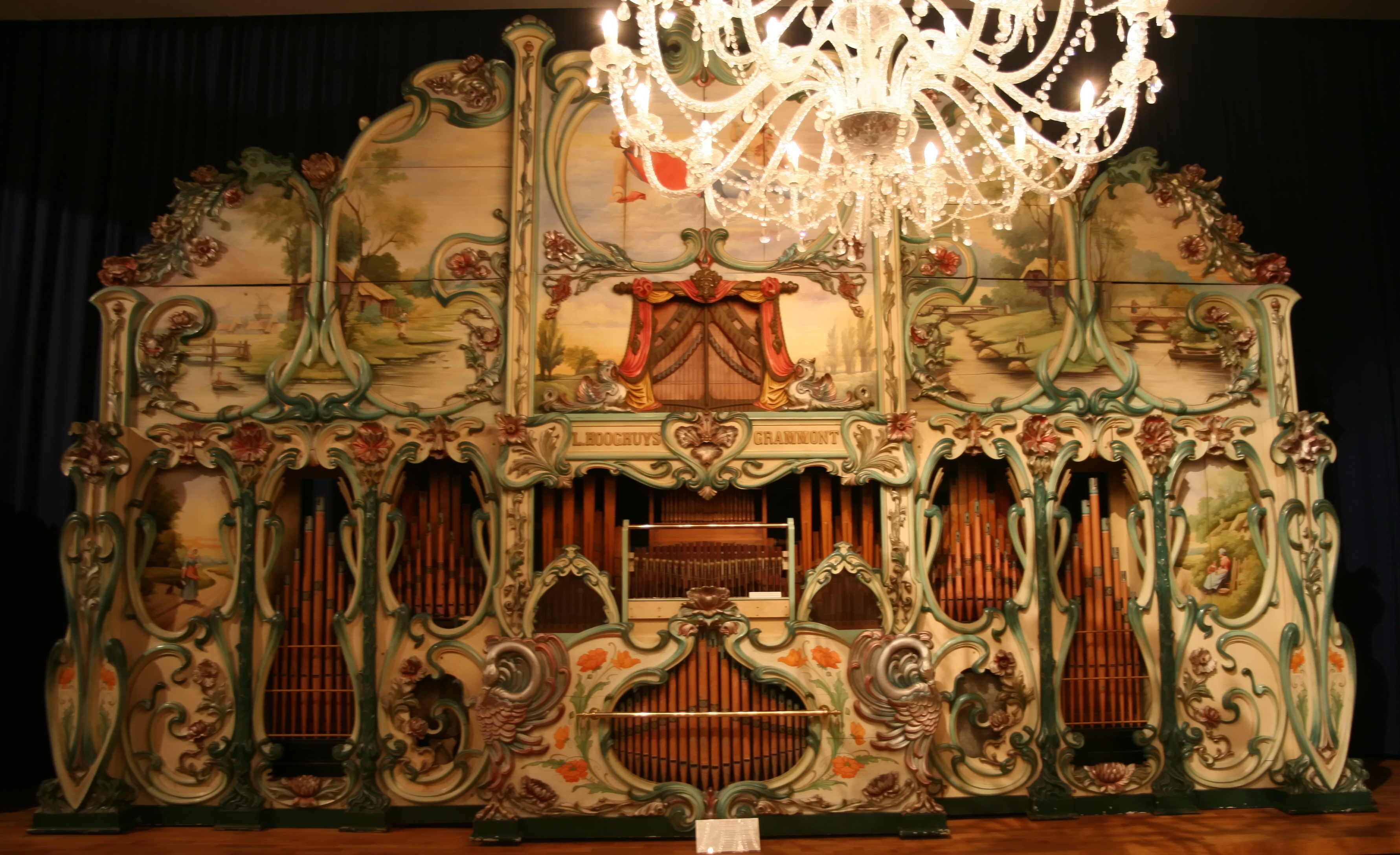 museum speelklok tot pierement (233)